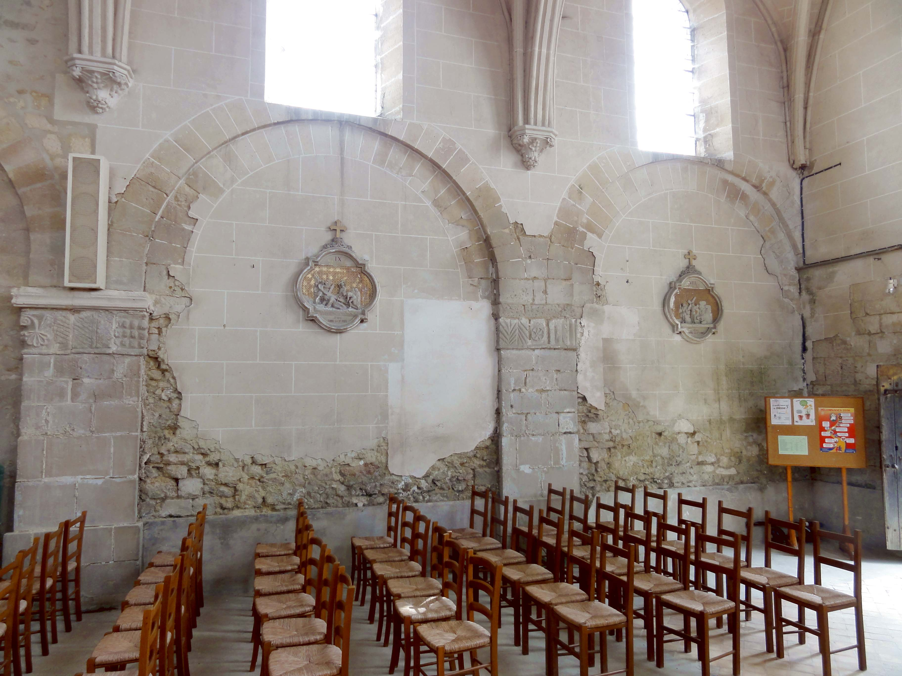 Intérieur de l'église - voir titre.